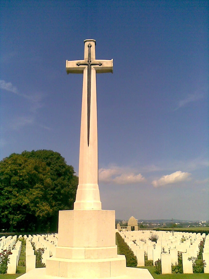 Soldatenfriedhof Niederzwehren-Ehrenkreuz mit Schwert